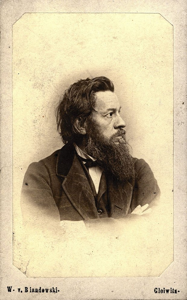 Wilhelm von Blandowski - Autoportret